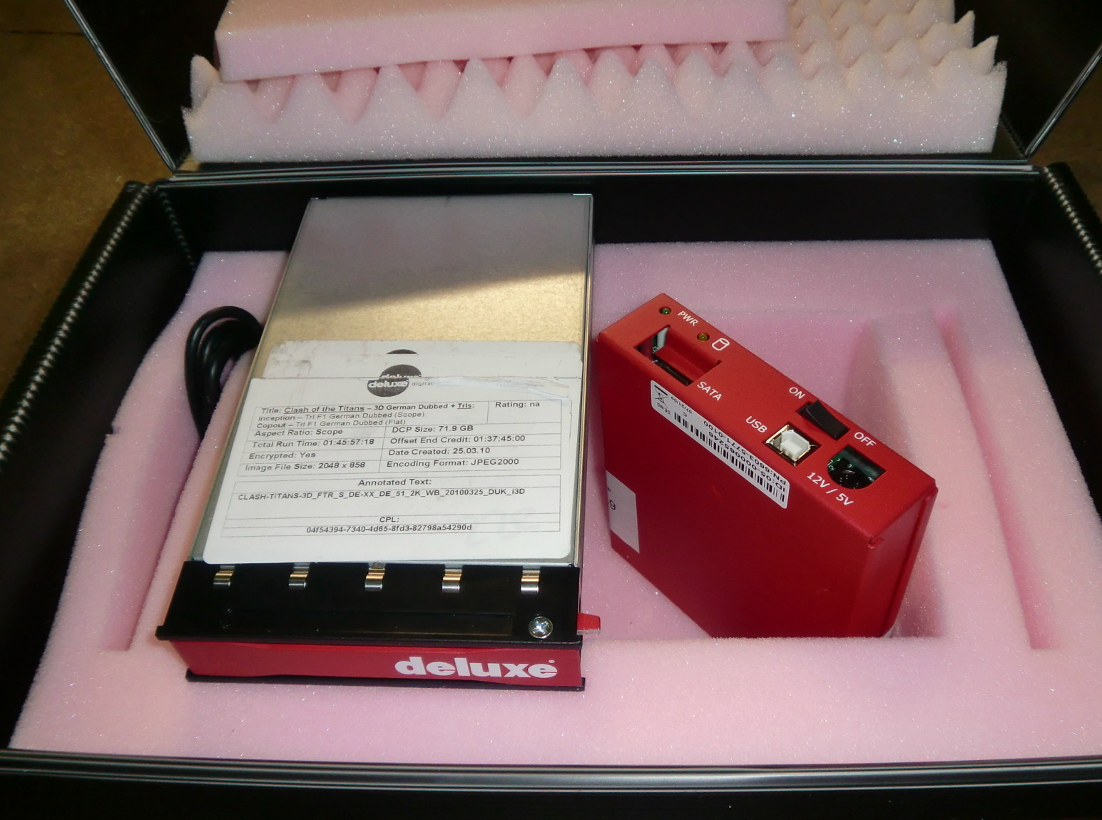 Festplatten mit digitalem Kinofilm Kampf der Titanen im Transportkoffer